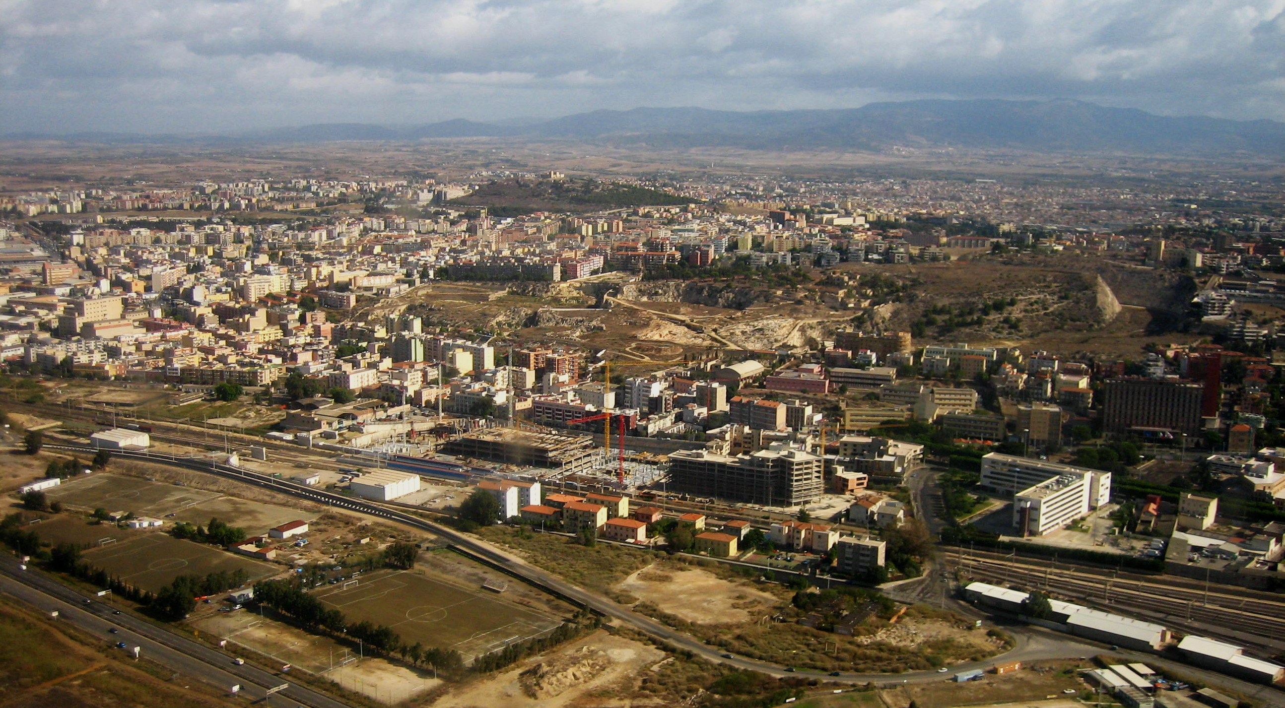 Quartieri Sant'Avendrace e Tuvixeddu, Cagliari